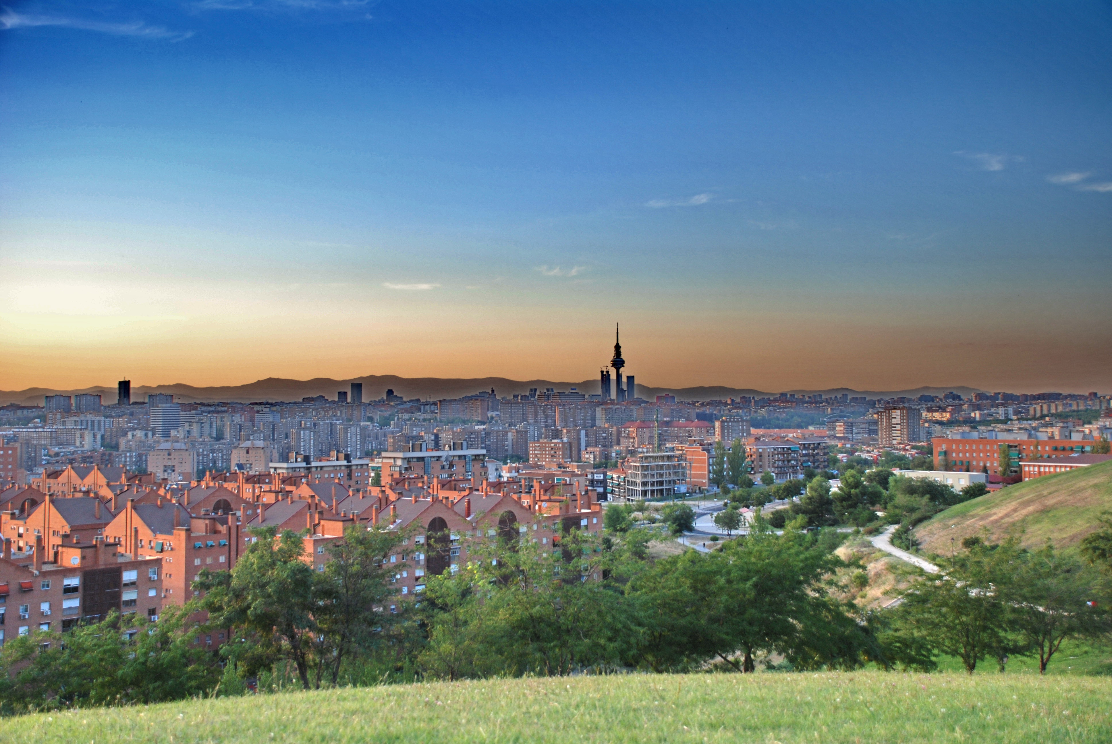 Madrid SkyLine - Cerro del Tío Pío